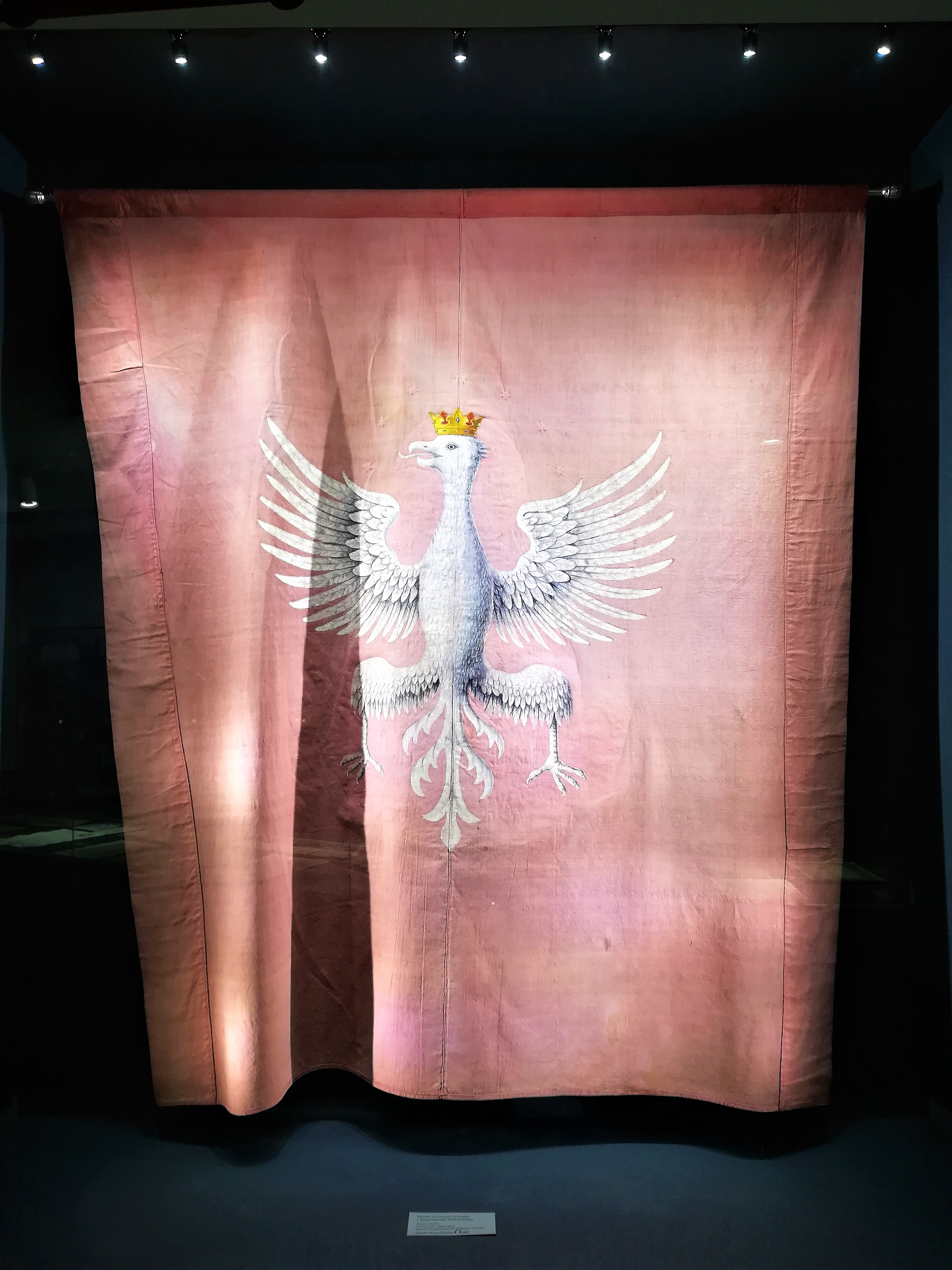 Sztandar patriotyczno-procesyjny z czau powstania wielkopolskiego, Gniezno, 1918r. MPPP Gniezno.